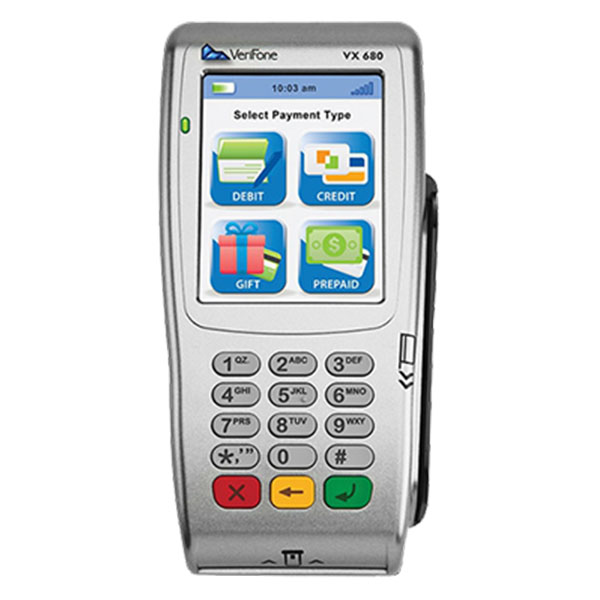 کارت خوان وریفون